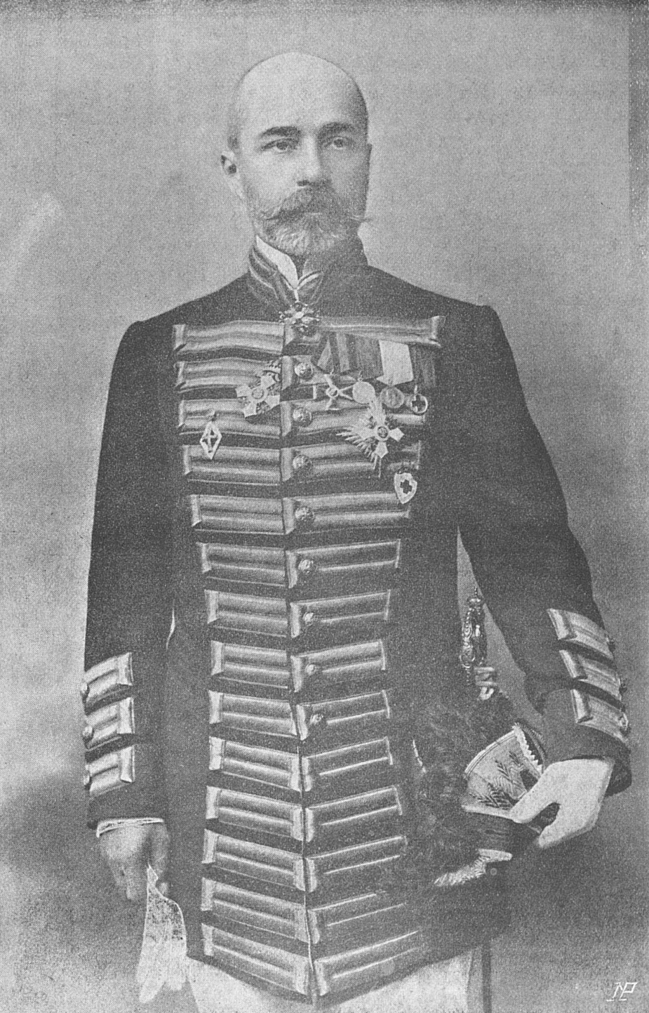 В должности гофмейстера Алексей Николаевич Харузин, товарищ министра внутренних дел.